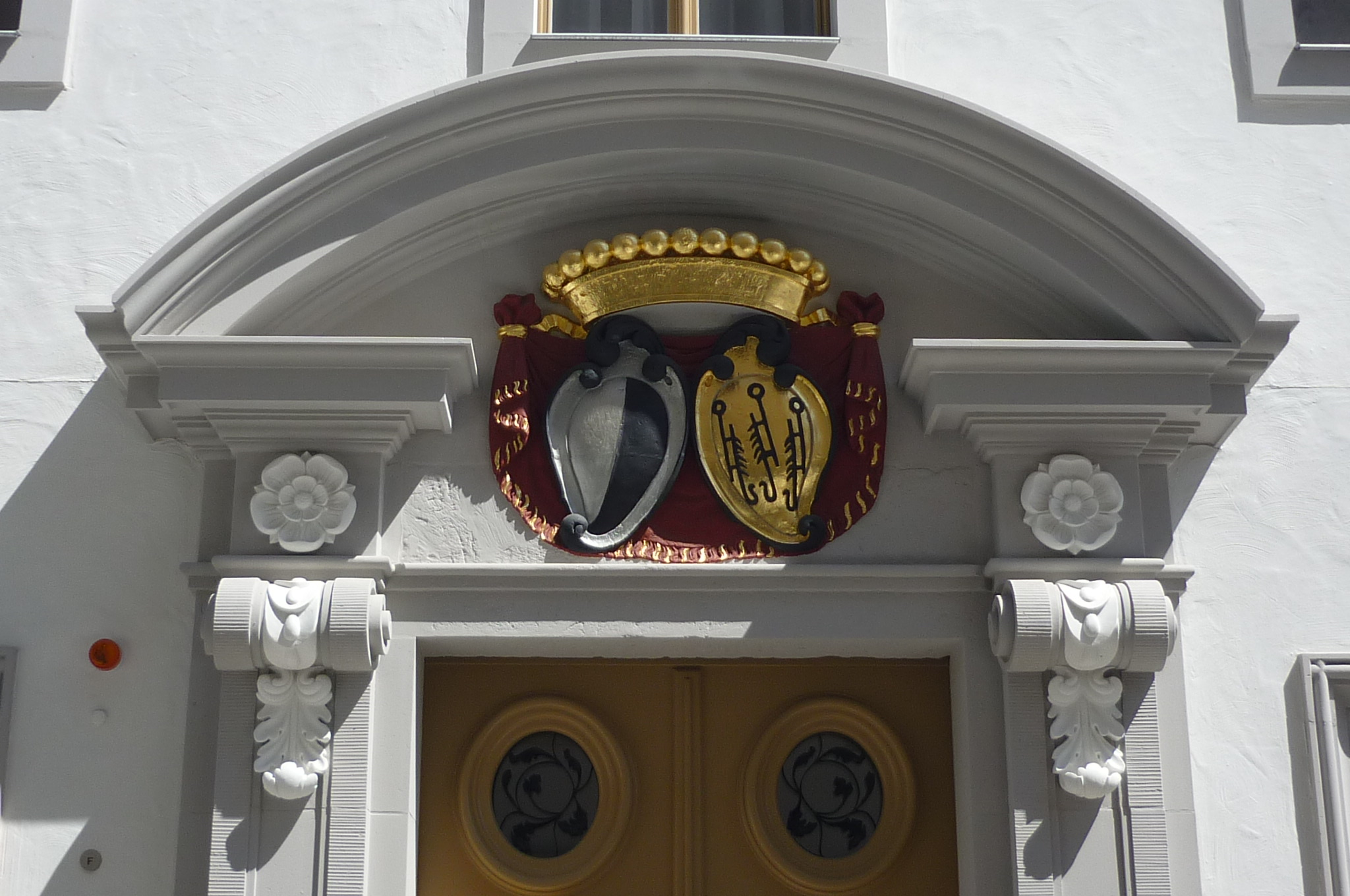 Allianz-Wappen Bose-Gustedt am Bose-Haus in Dresden, Sporergasse Ecke Schössergasse